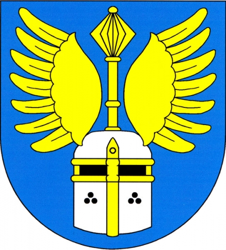 znak, Rataje, okres Tábor